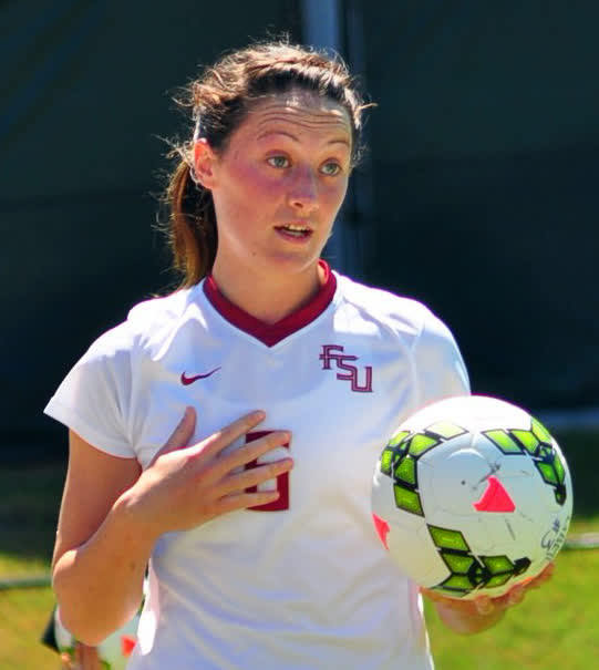 "The Arm Returns": FSU defender Megan Campbell in September 2015